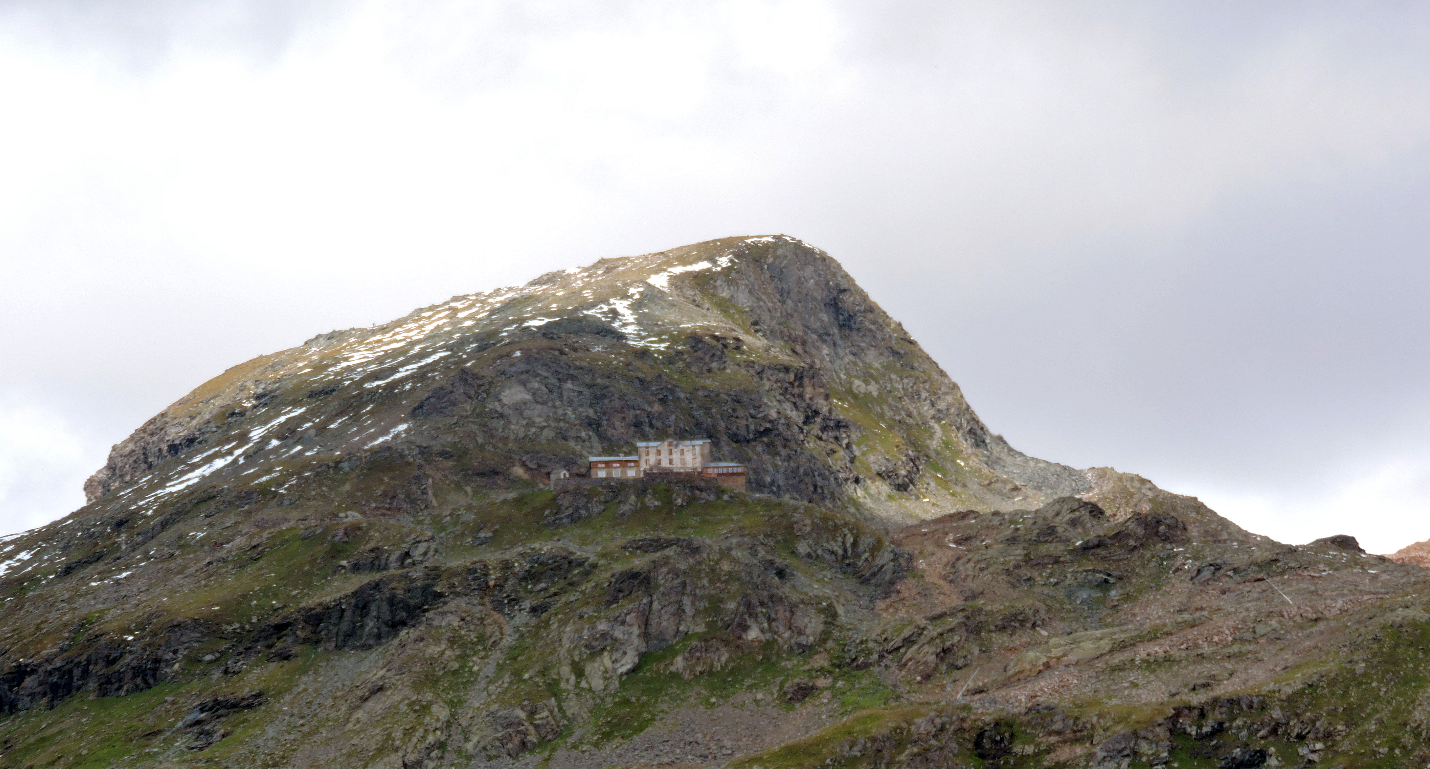 Il Corno del Camoscio (Alpi Pennine) visto dal Passo Foric